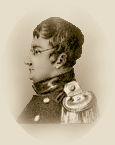 Портрет Гавриила Степановича Батенькова (25.03.1793 - 29.10.1863) с рисунка первой половины XIX века